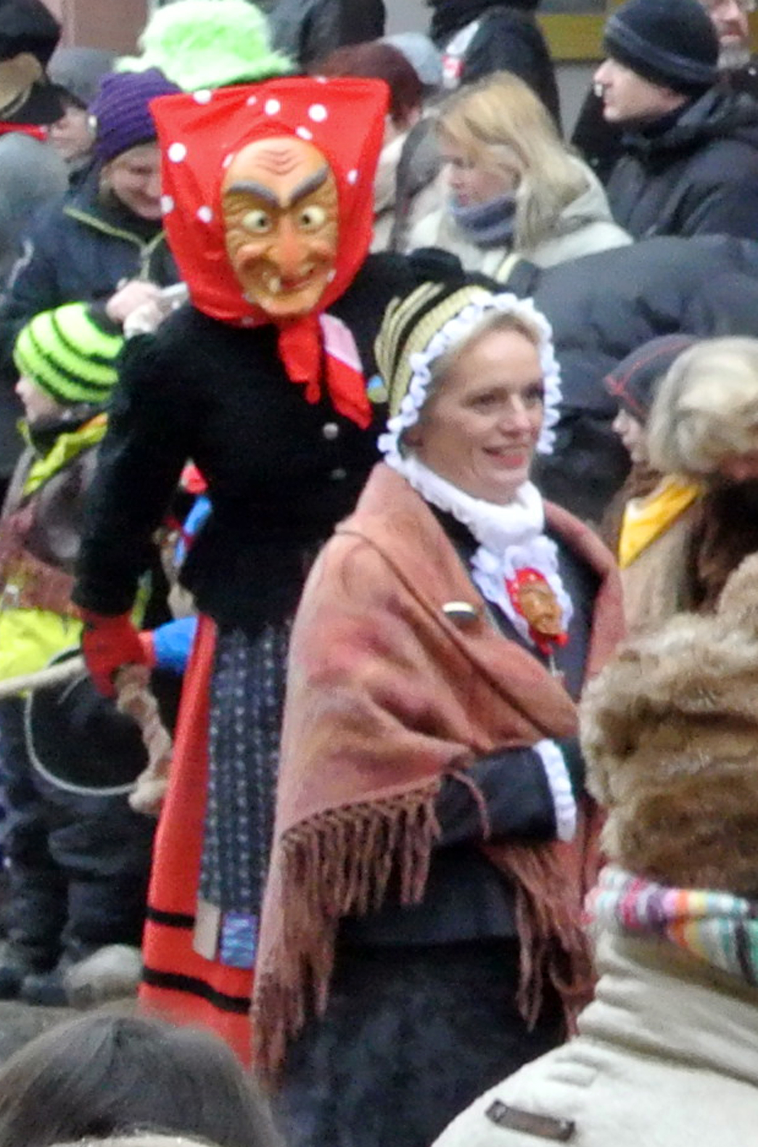 Alt-Offenburgerin und Hexe der Offenburger Hexenzunft e.V. beim Jubiläumsumzug 150 Jahre Narrenzunft Krakeelia Waldkirch e.V. am 01.02.2015